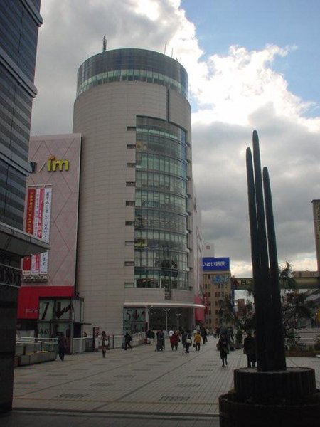 Isetan department store, Kokura Kita ward, Kitakyushu Taken and uploaded by Ian Ruxton (Historian)